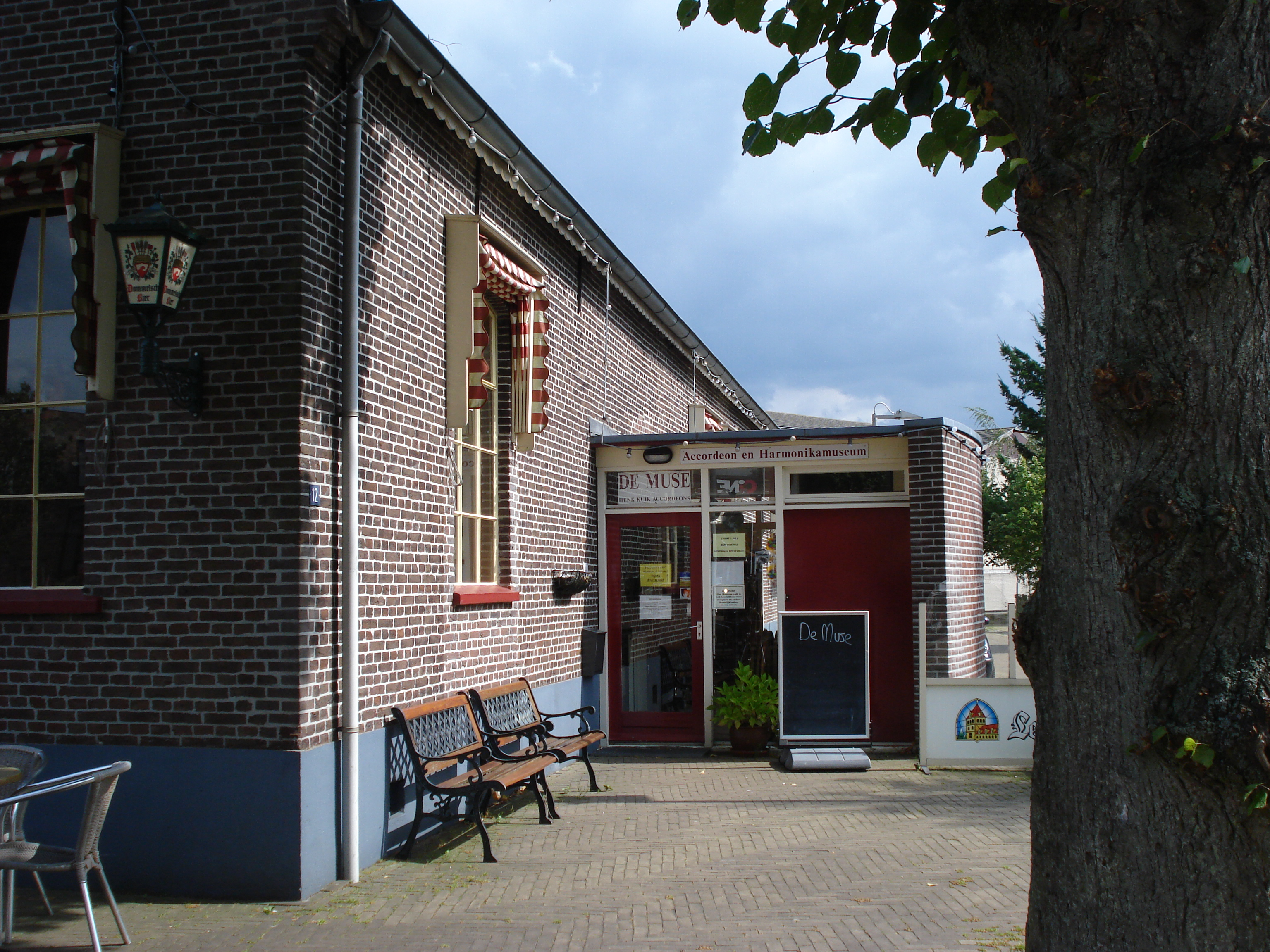 Accordeon- en Harmonikamuseum in Malden